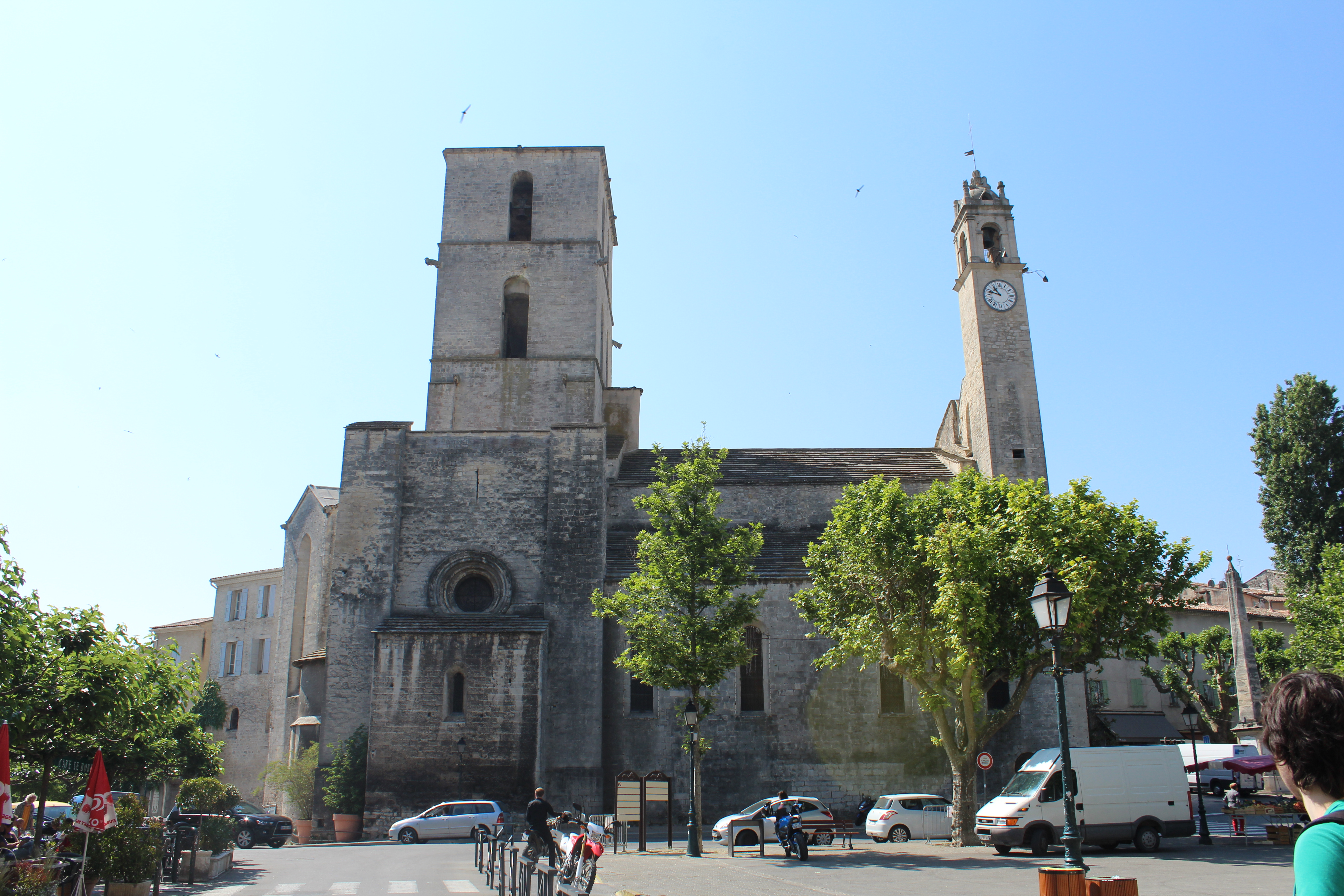 Cathédrale Notre-Dame du Bourguet de Forcalquier.